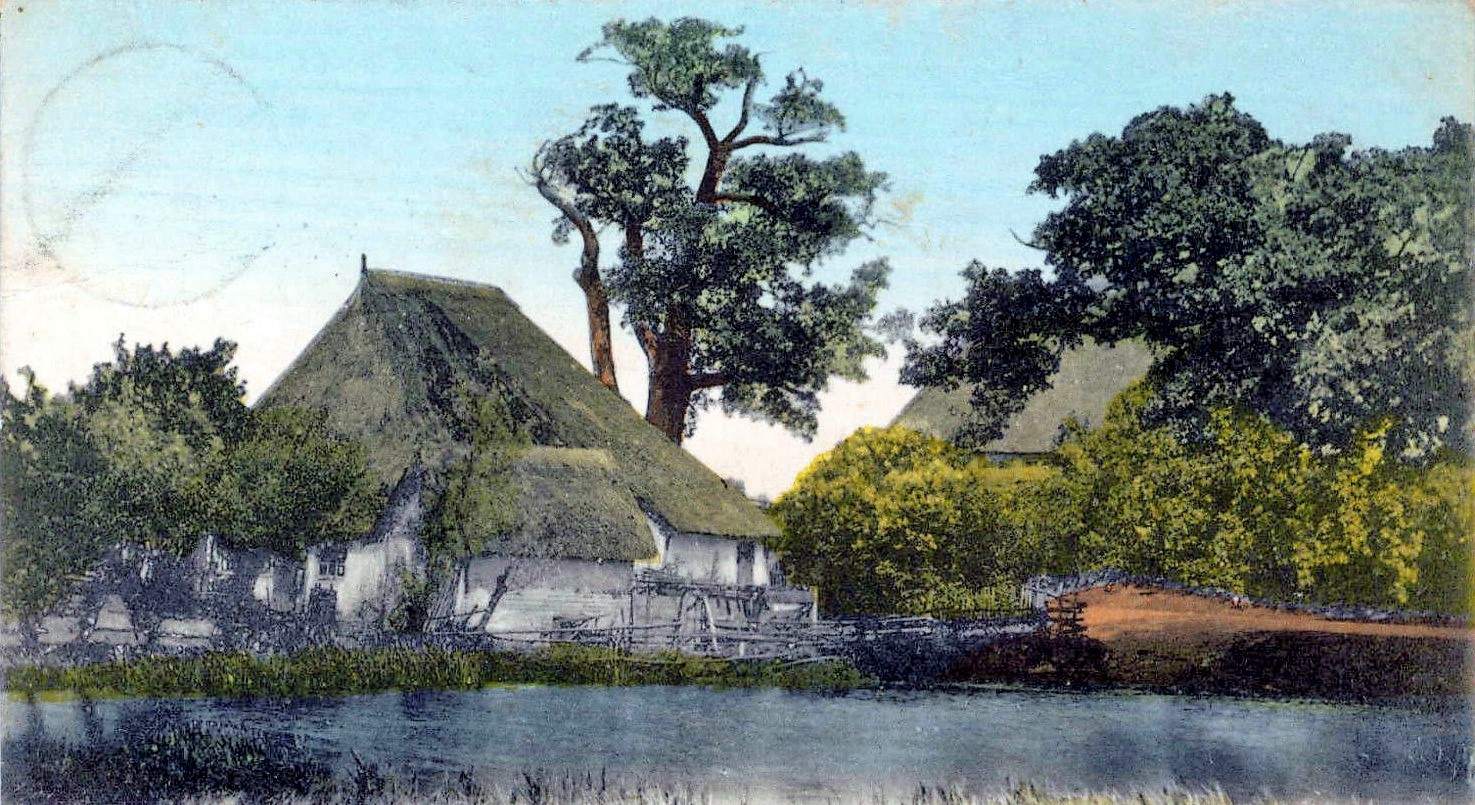 Blick von der Trave auf Israelsdorf mit der Eiche im Hintergrund.